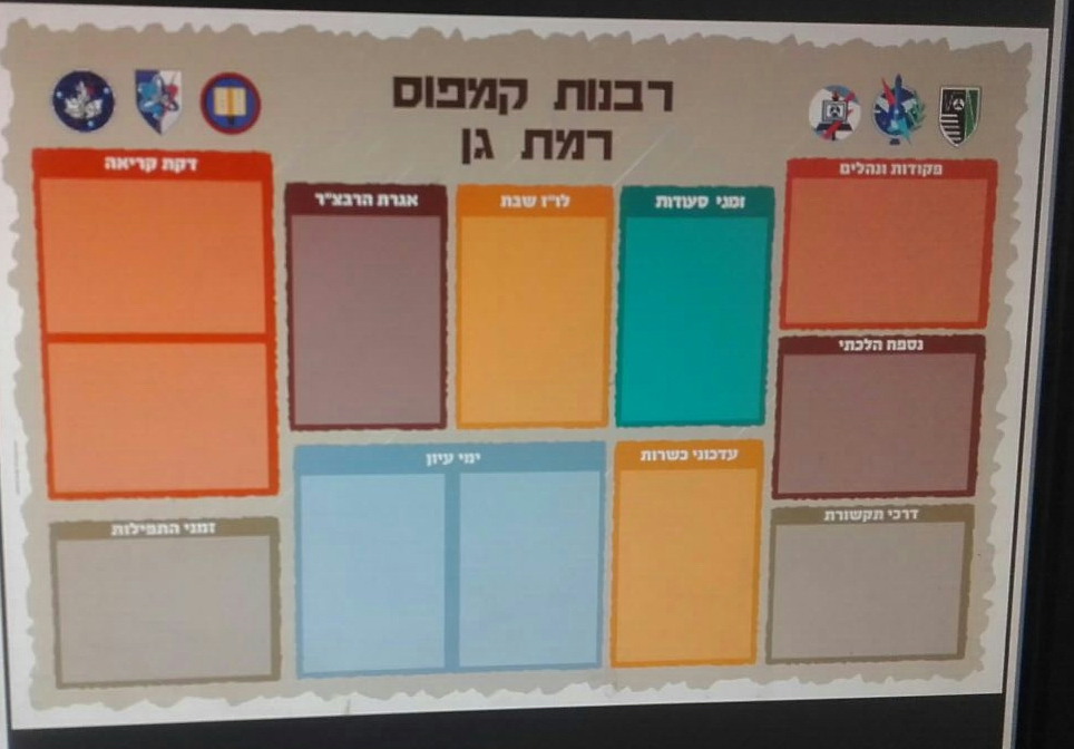 אחד מתפקידיו של מש"ק הדת בצה"ל הוא לעדכן את לוח היהדות ביחידה באופן שוטף. בתמונה מוצג לוח לדוגמא מבסיס השלישות רמת גן